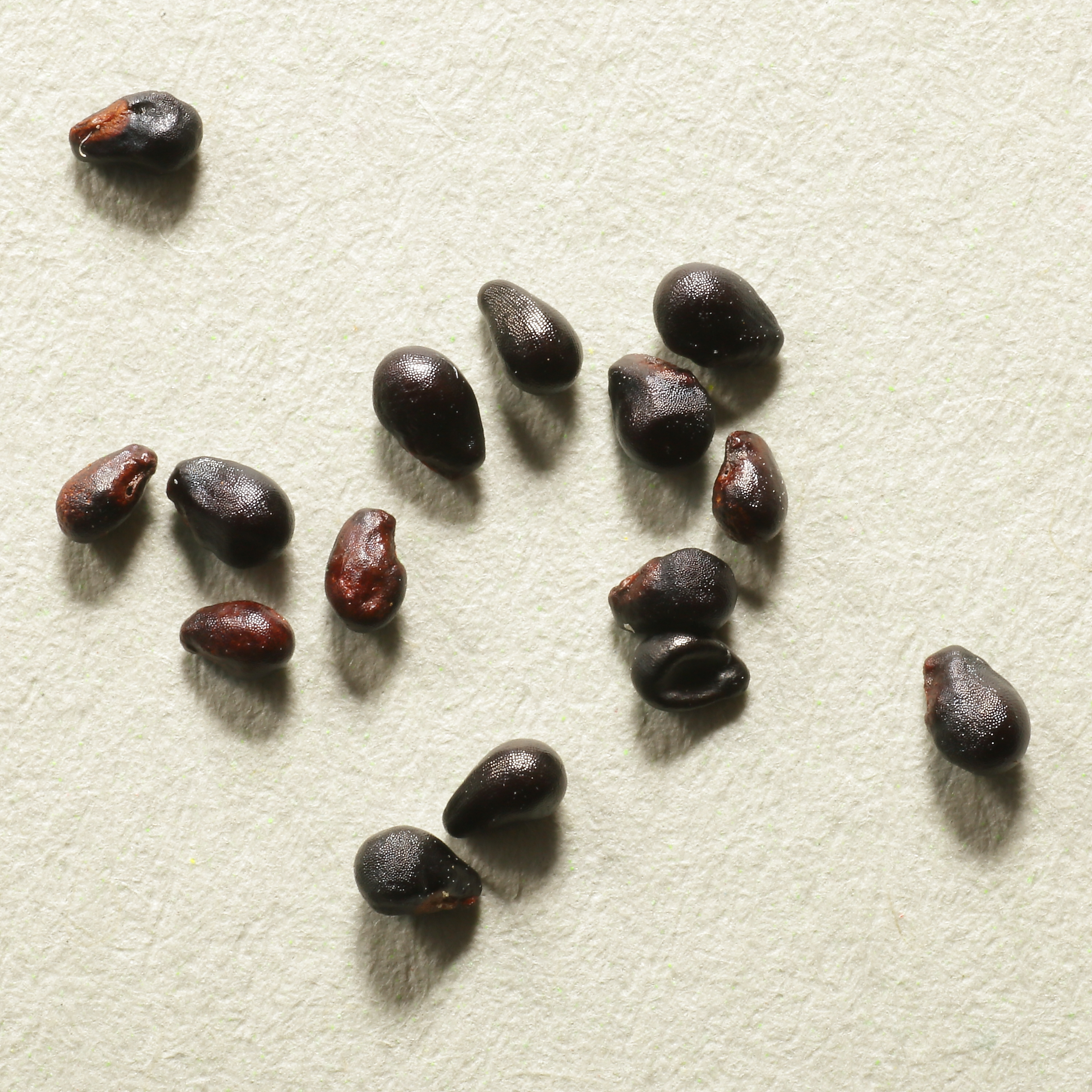 Frön från (Rimacactus lauii) Eriosyce laui.